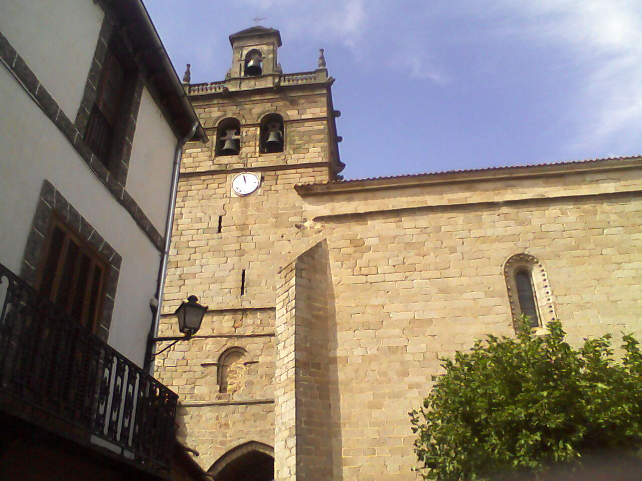 Torre de Santa María la Mayor de Ledesma. Iniciada a finales del s. XII en estilo Románico final, continuada a finales del s. XV en estilo gótico final y concluida en 1580 en estilo herreriano.